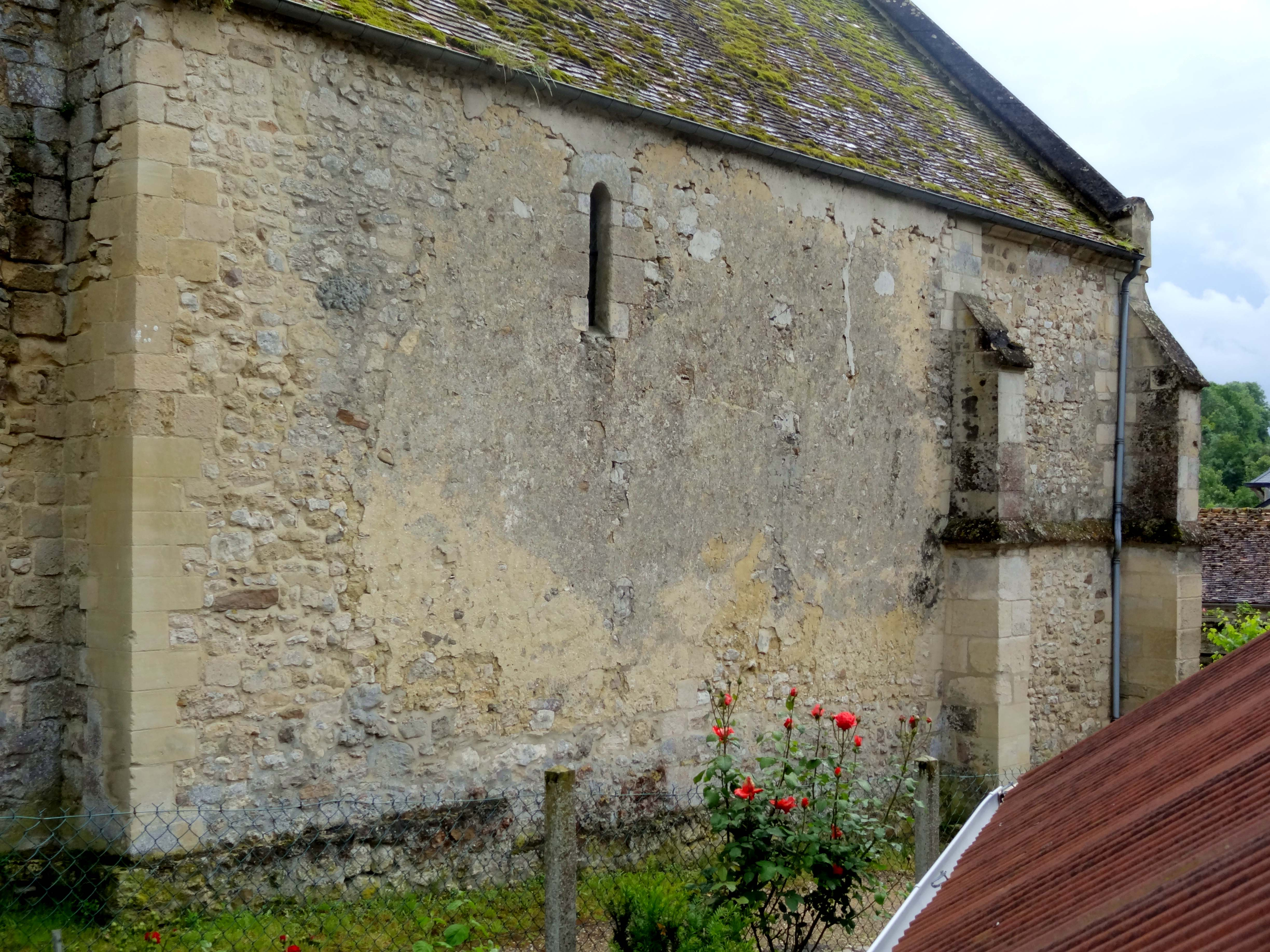 Nef, vue depuis le nord-est.